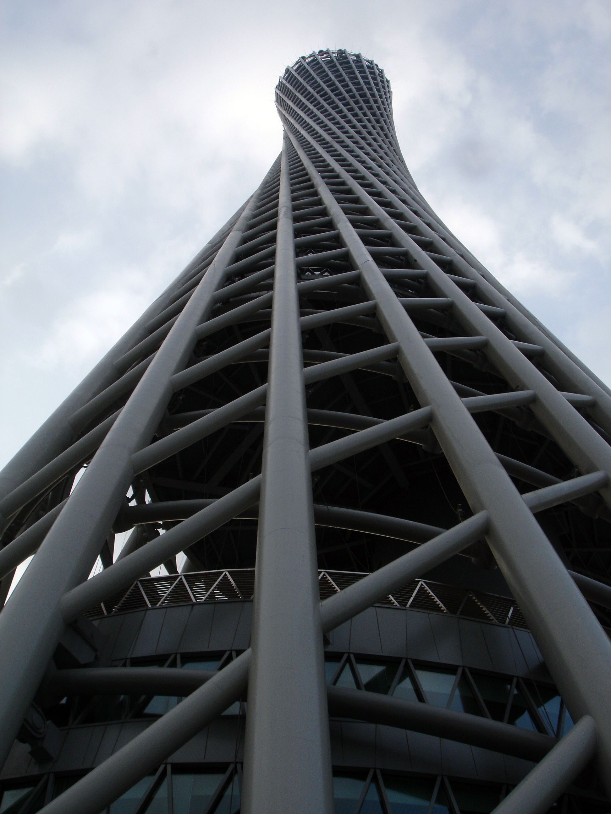 從塔底仰視廣州塔